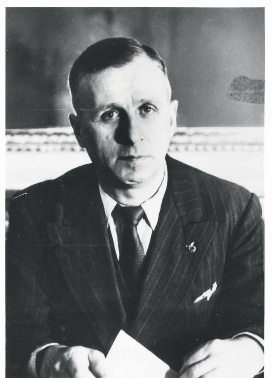 Ambroize Croizat, ministre du travail entre 1946 et 1947